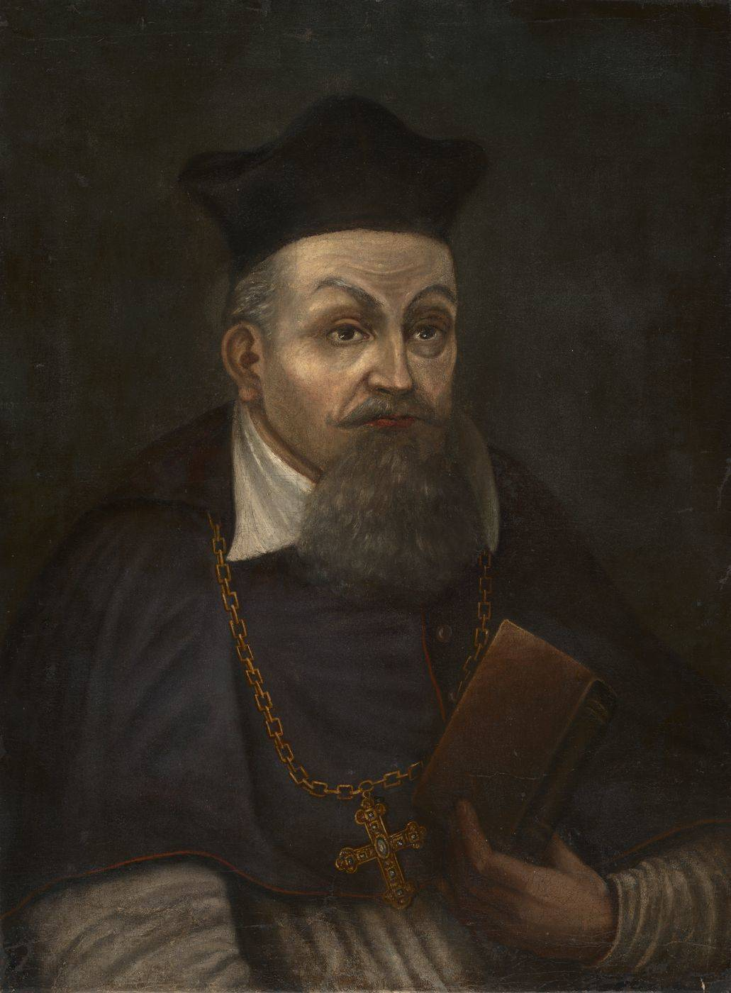 Беларуская (тарашкевіца): Партрэт Яўстаха Валовіча (Jaŭstach Vałovič)